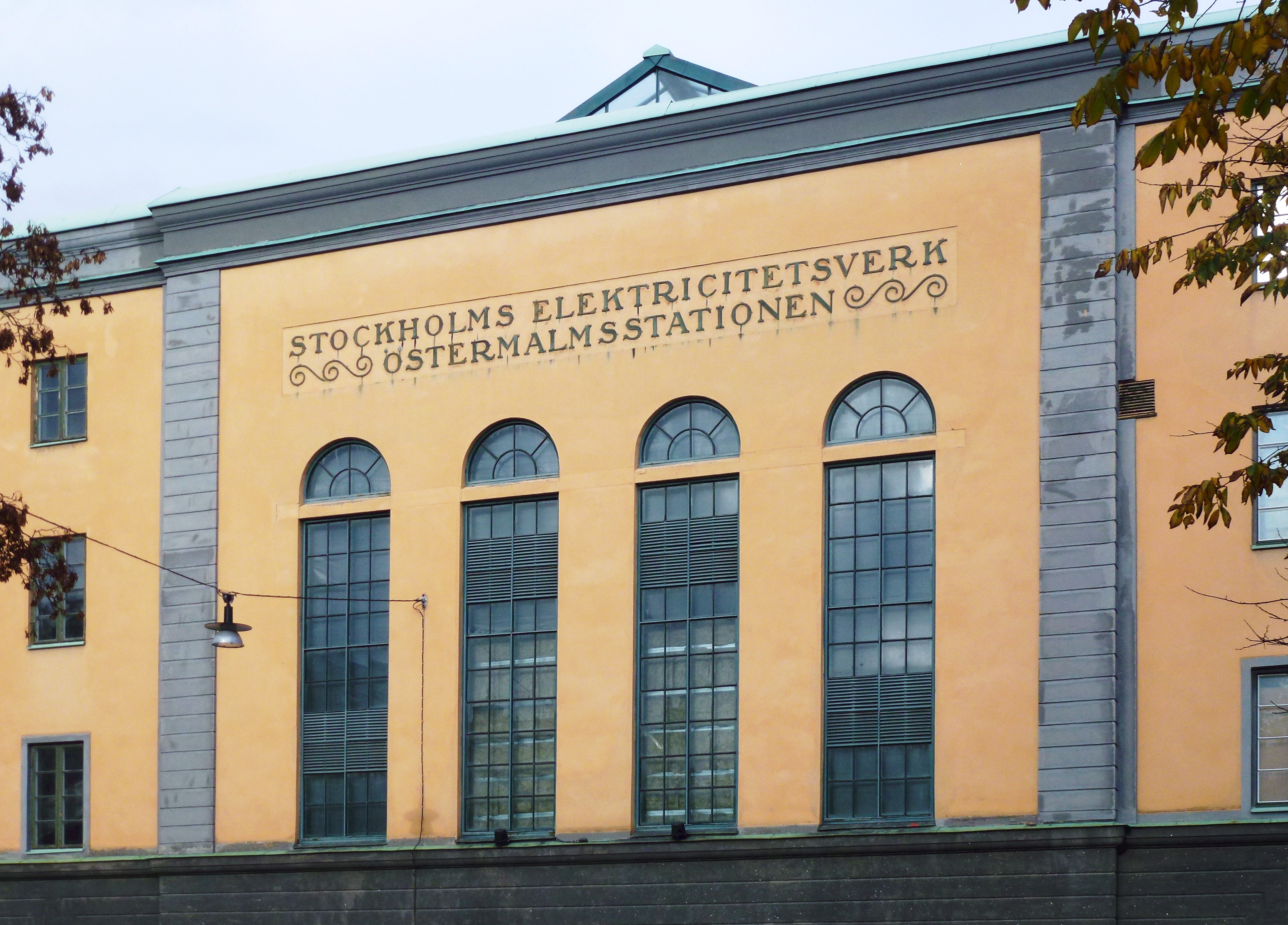 Östermalmsstationen